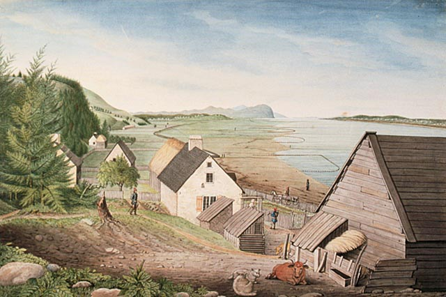 « La diversité des activités économiques des habitants est évoquée par la proximité des collines et de la forêt, les filets de pêche à l'anguille dressés sur la batture et jusque dans le Saint-Laurent, le potager devant la maison de ferme blanchie à la chaux et le bétail à l'ombre de la grange. » – Peter Gossage et J.L. Little, Une histoire du Québec, Entre tradition et modernité, Les Éditions Hurtubise, Montréal, 2015, encart entre les pages 240 et 241.